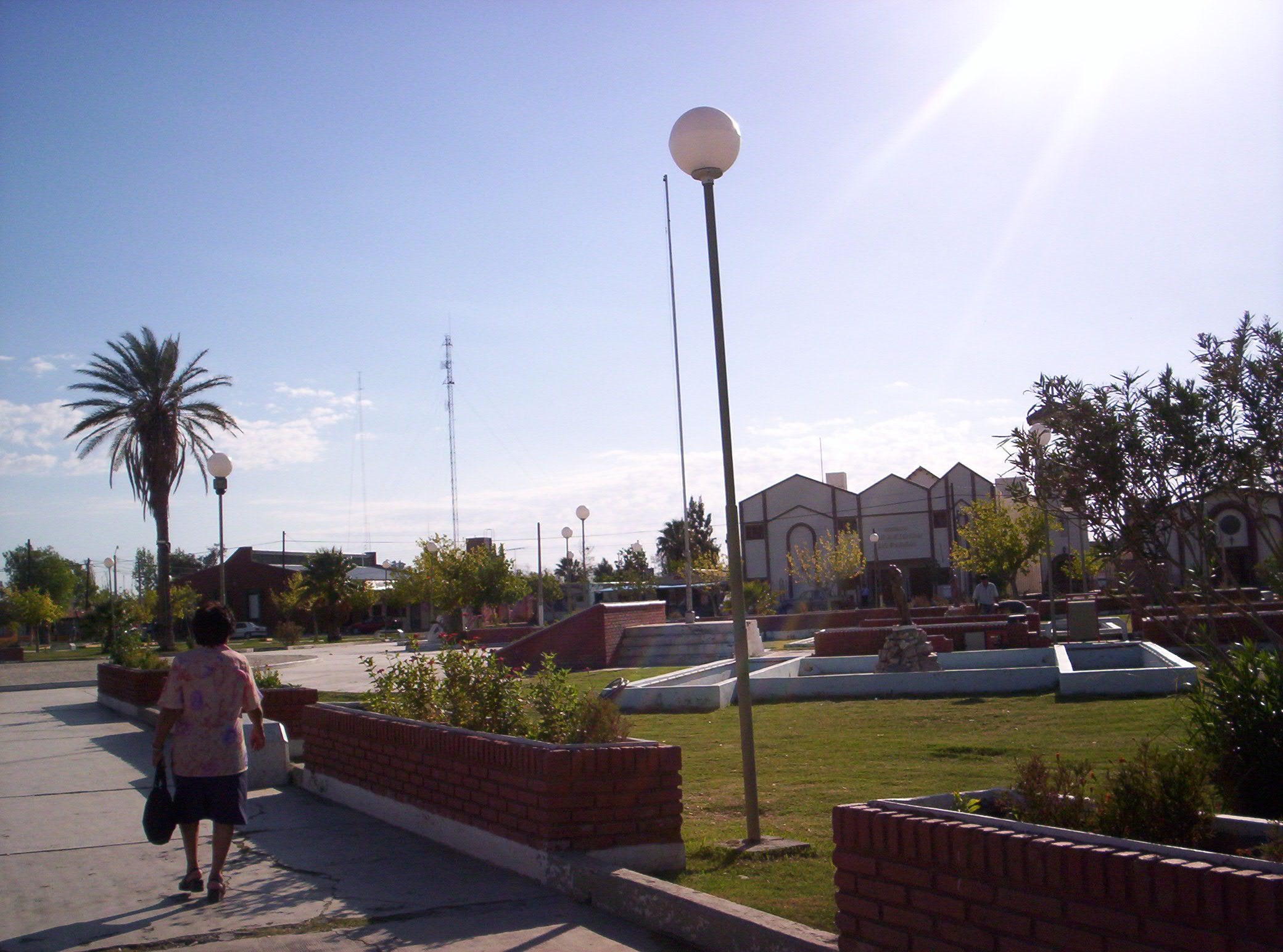 Plaza principal de la localidad de Media Agua, departamento Sarmiento, provincia de San Juan, Argentina The main square of the town of Media Agua, department Sarmiento, San Juan Province, Argentina